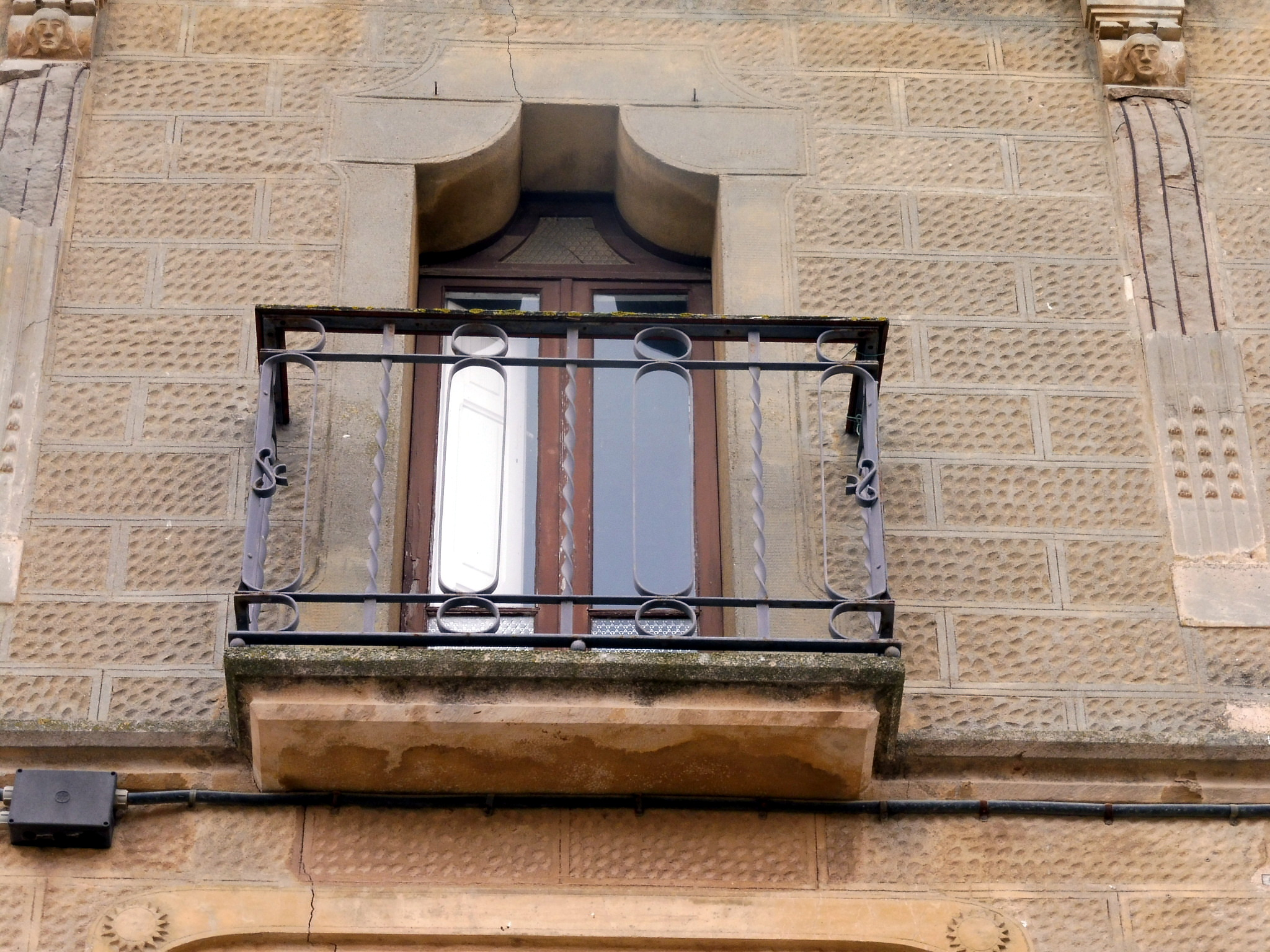 Ca la Simona de Boldú (la Fuliola)